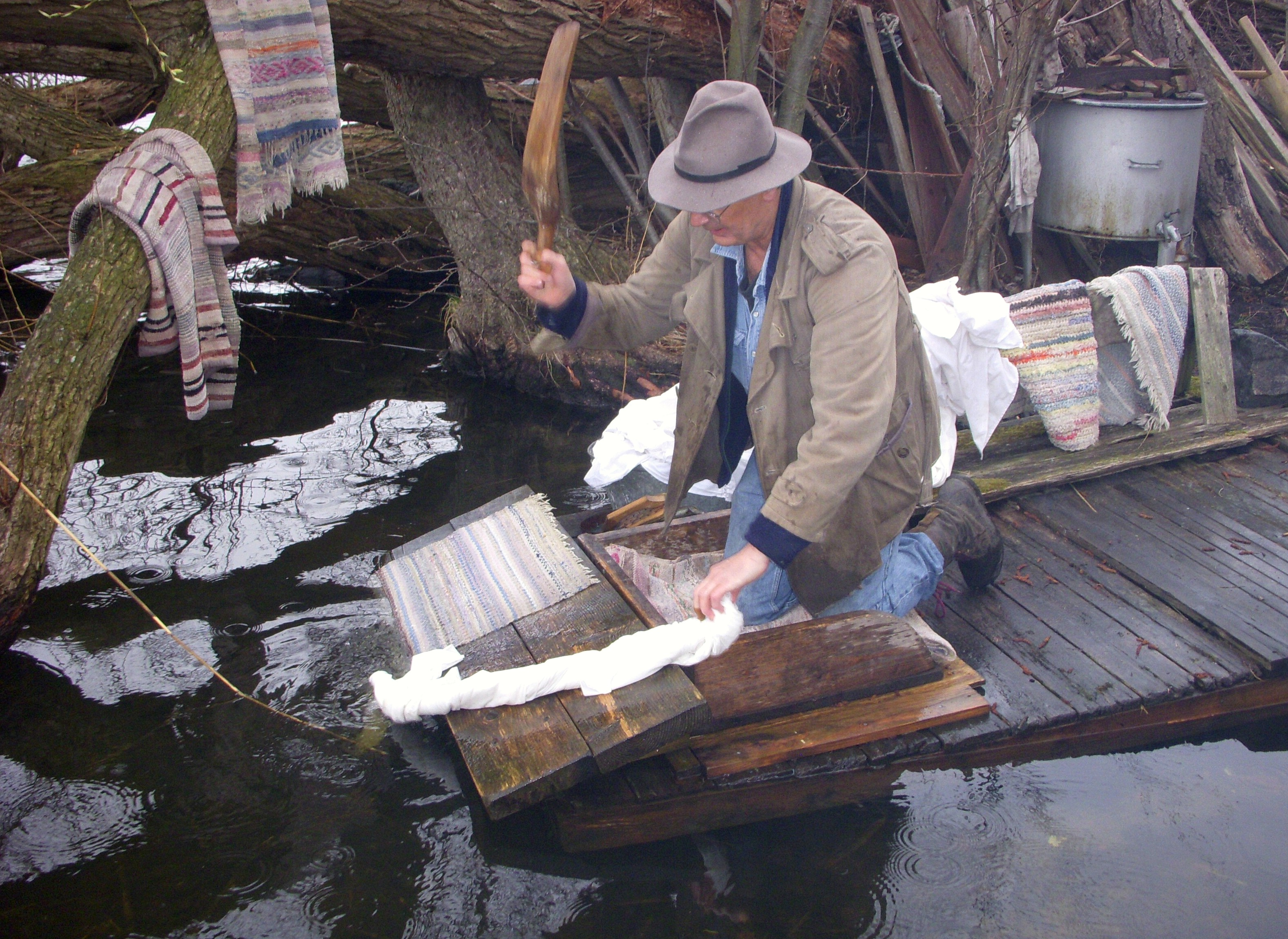 Hagalunds Tvätterimuseum i Huddinge, vår-byken